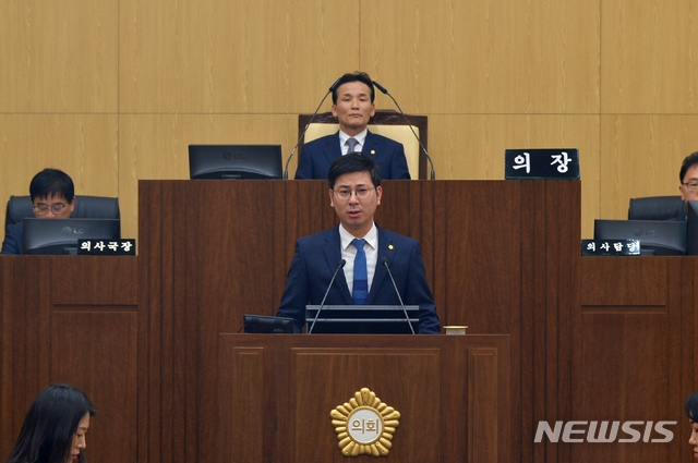 울주군의회의장 간정태